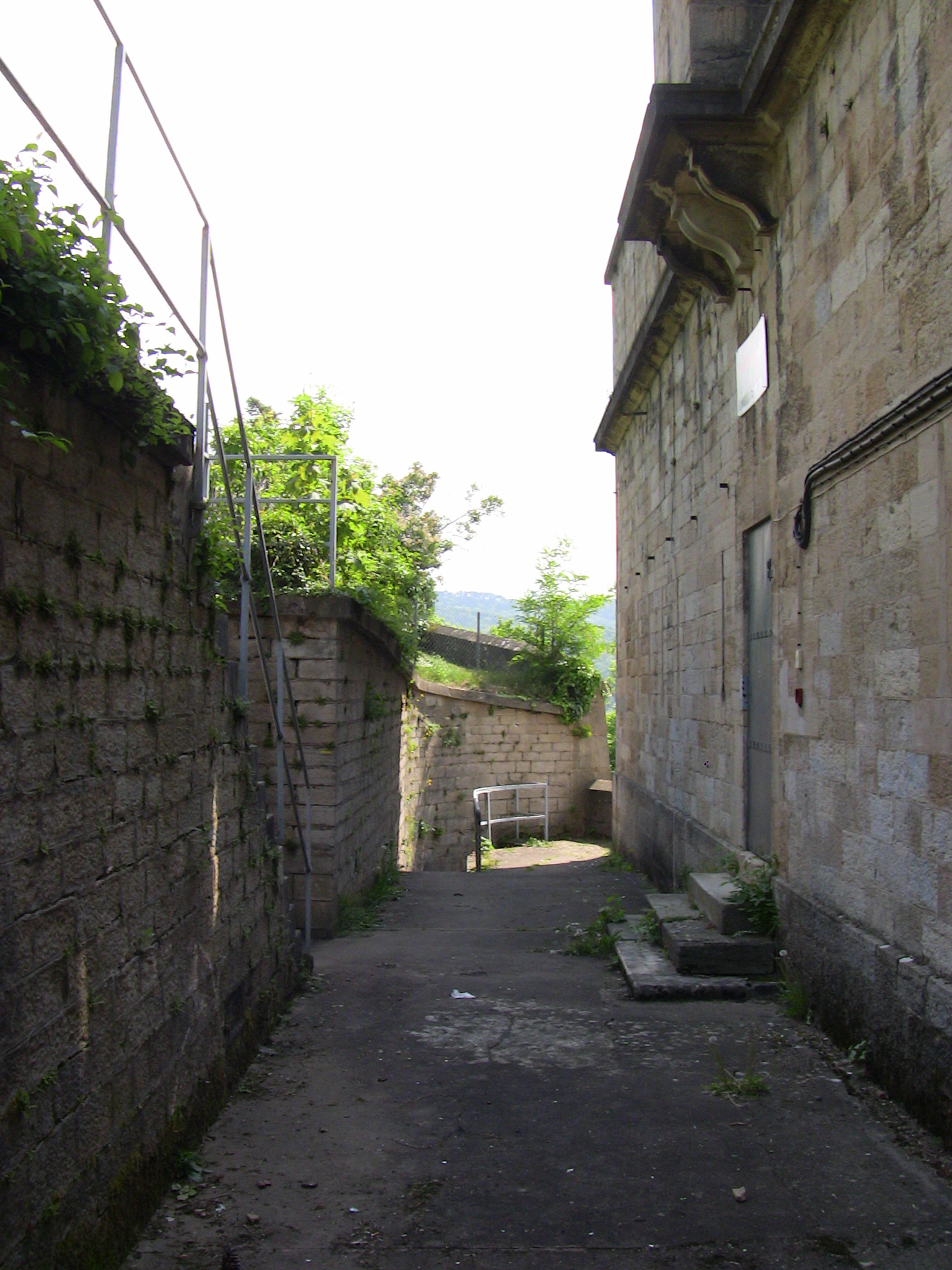 Passage d'accès entre le square et le front arrière du fort de Beauregard à Besançon (Doubs, France).